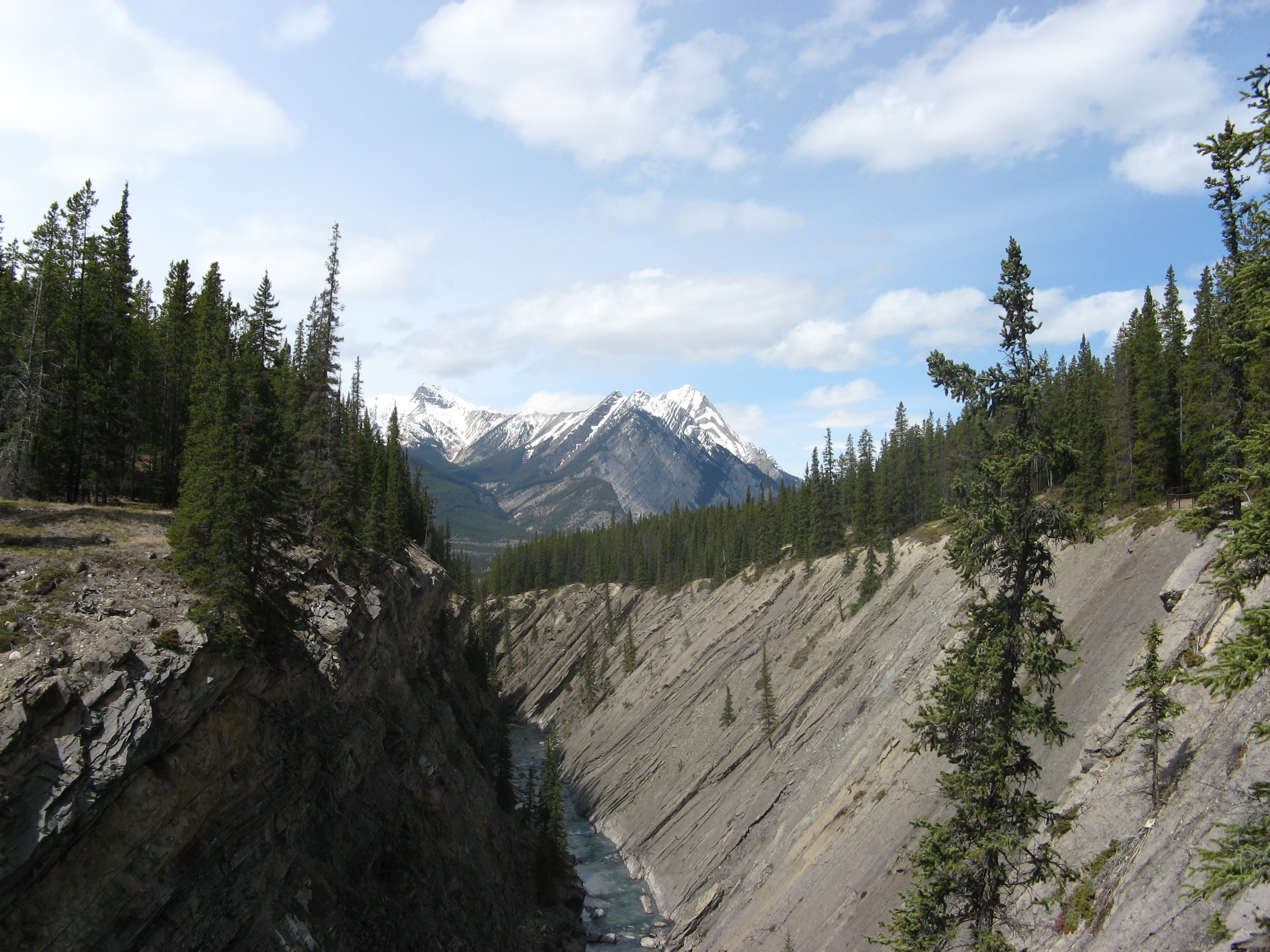 Siffleur Gorge